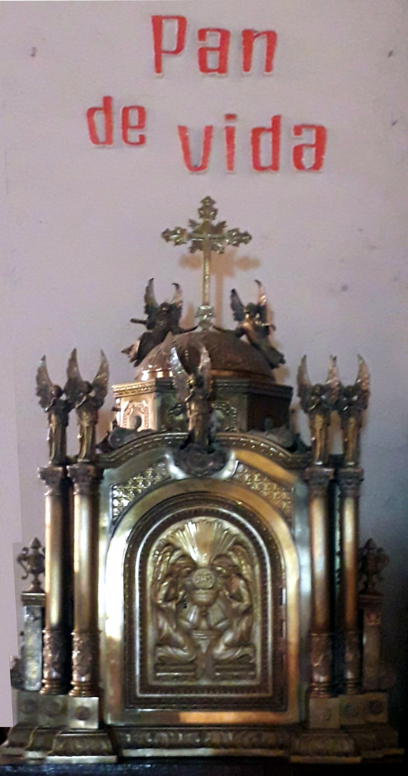 Capilla del Santísimo Sacramento de la Parroquia de San José de Jatibonico y Arroyo Blanco en Cuba.